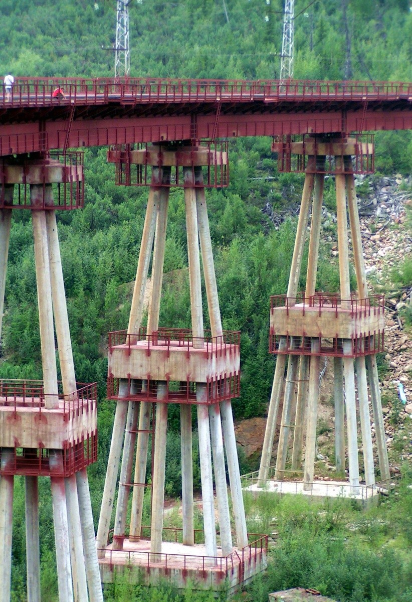 Опоры "Чёртового моста" на БАМе